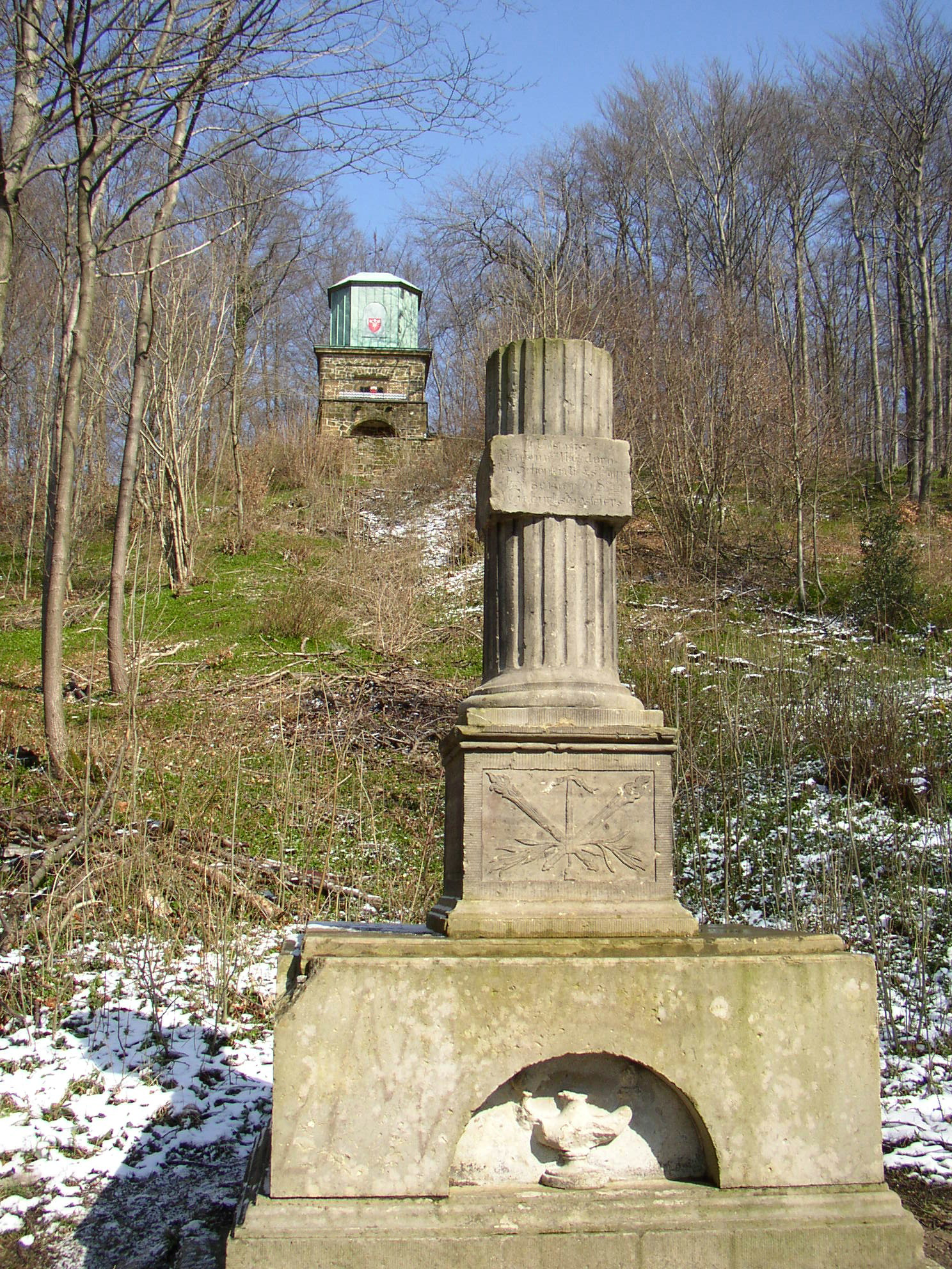 Kaffeemühle & Hagedorn-Denkmal im Naturschutzgebiet „Knüll/Storkenberg“ in Halle (Westf.)